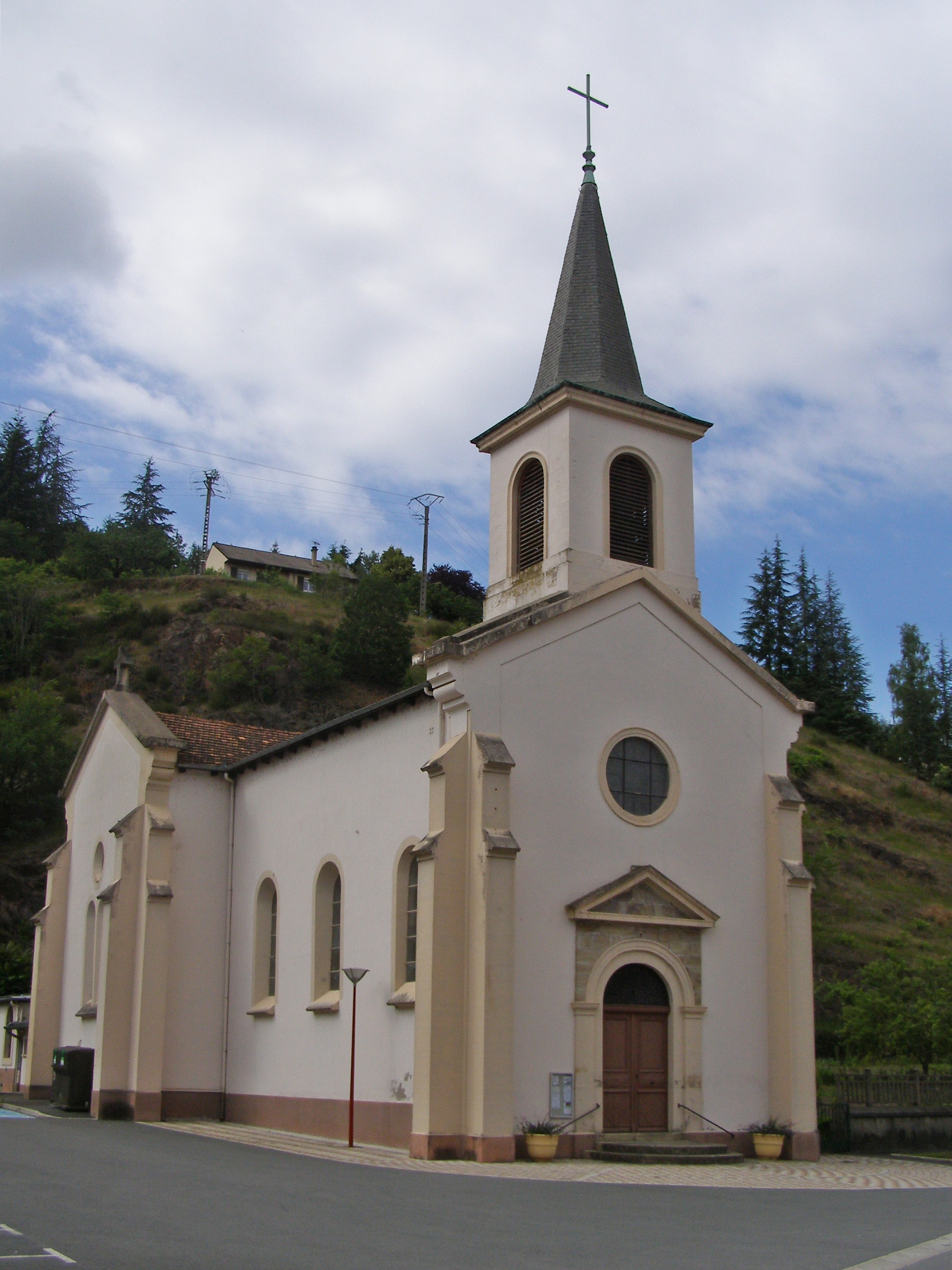 Eglise de Viviez